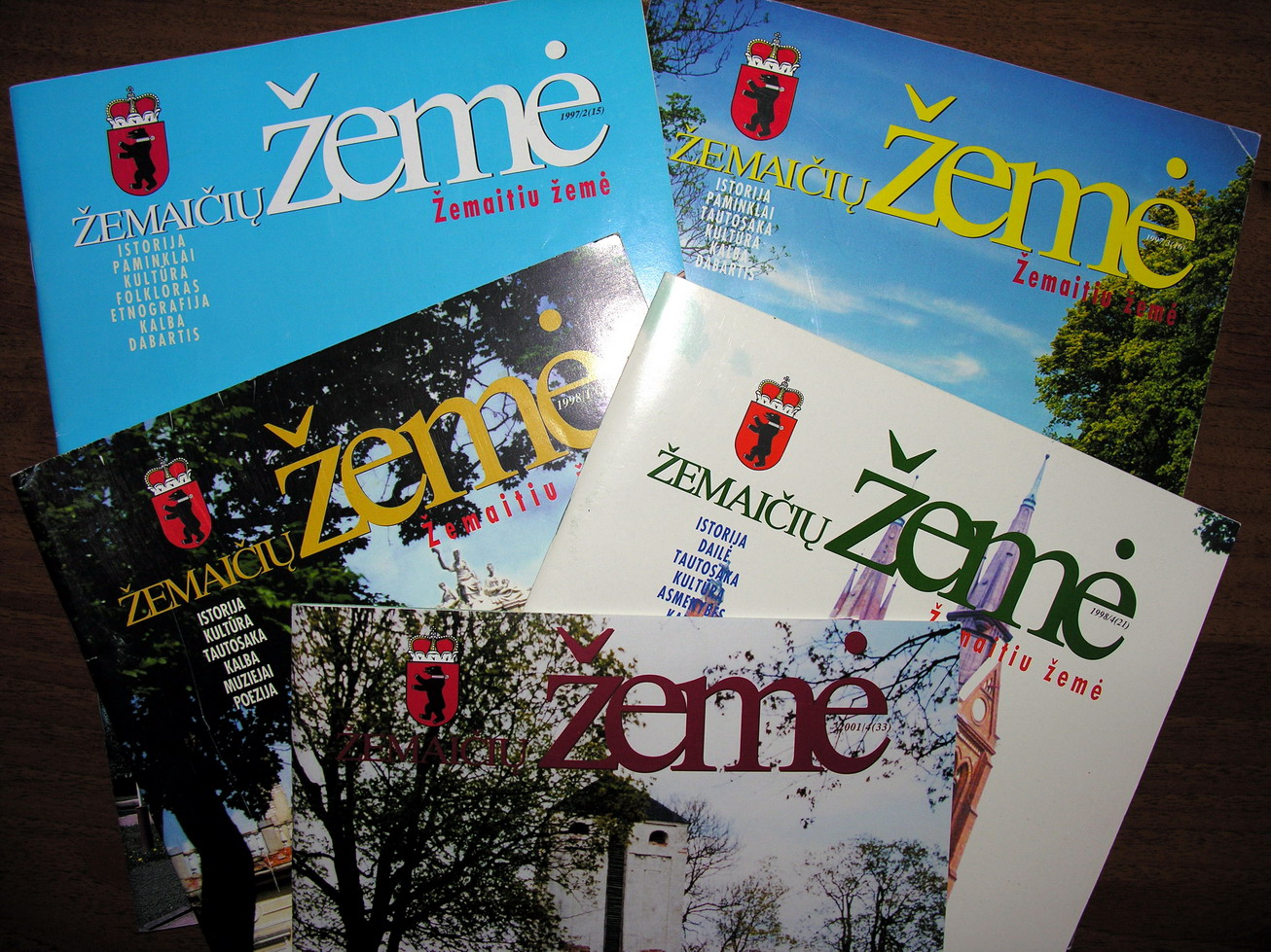 Žemaičių žemė Foto: Algirdas, 2006 m. spalio 17 d.